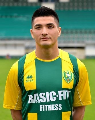 Paul Mulders